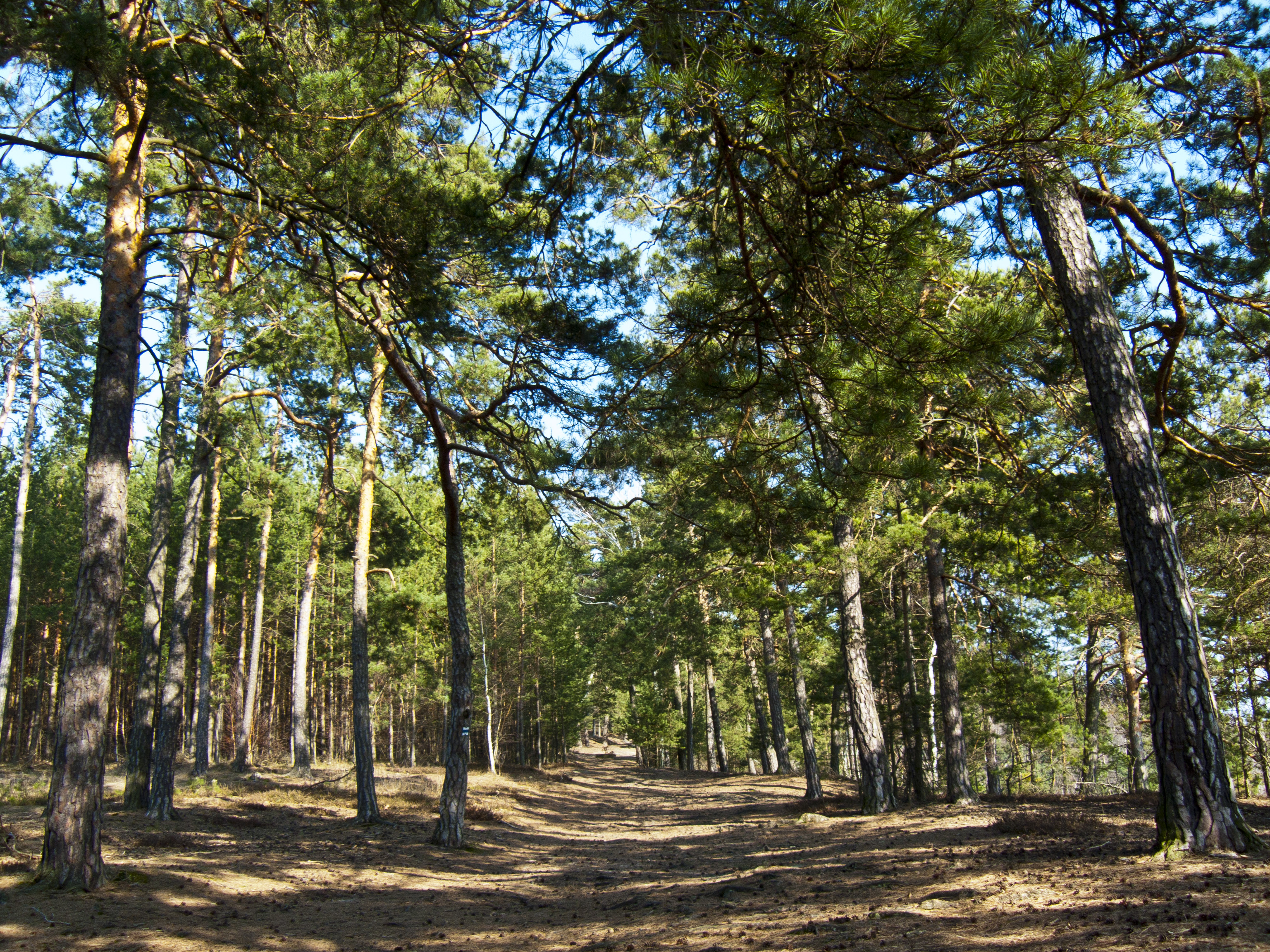 Přírodní památka Borecké skály - porost reliktního boru